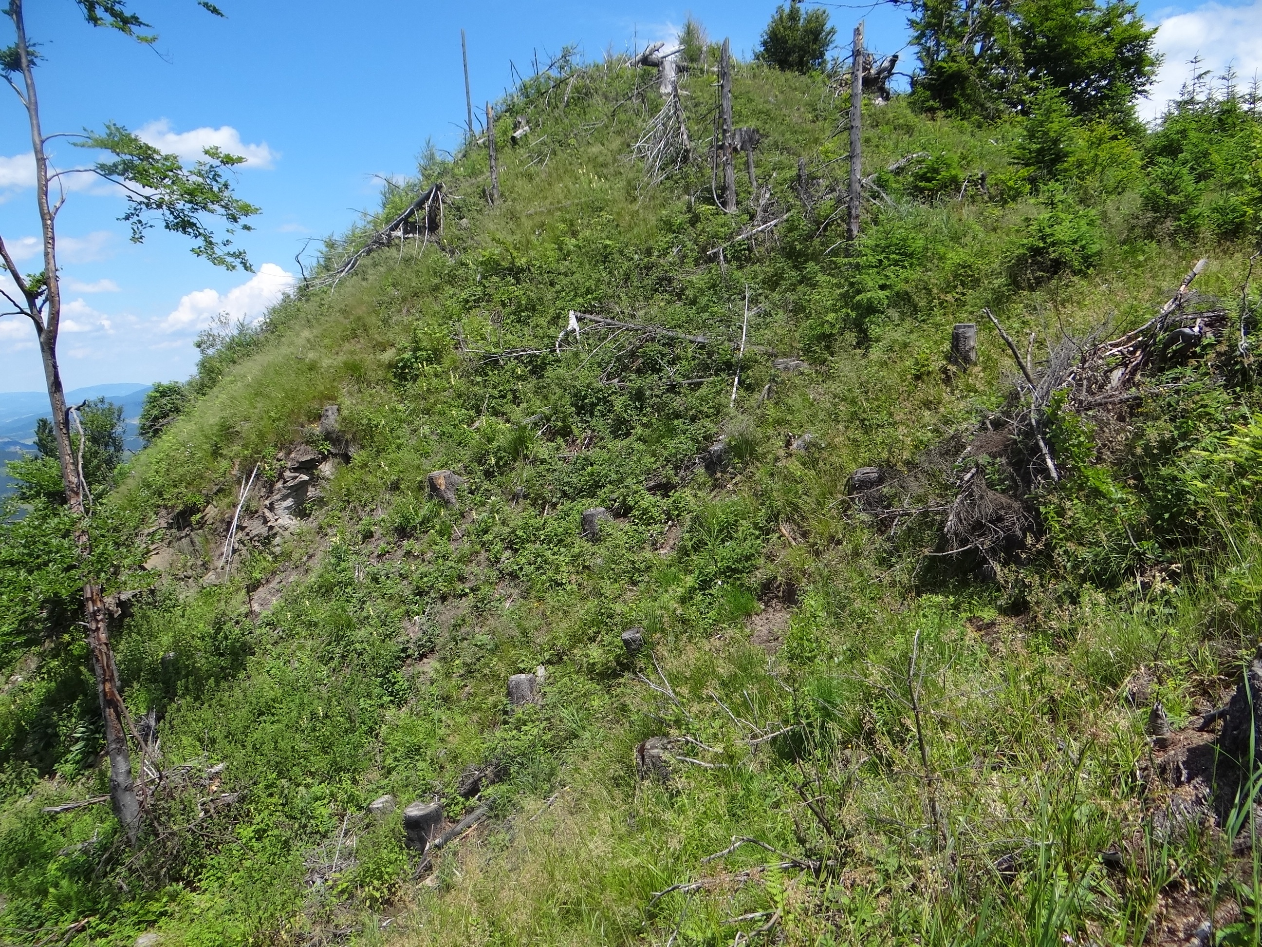 Veterný vrch